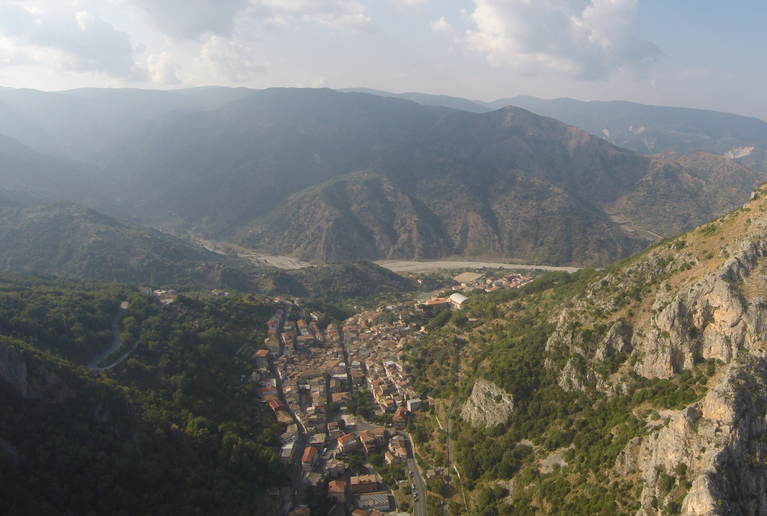 Pazzano dall'alto